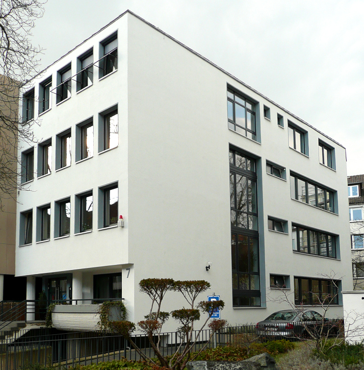 Vereinigte Schiffs-Versicherung Hannover